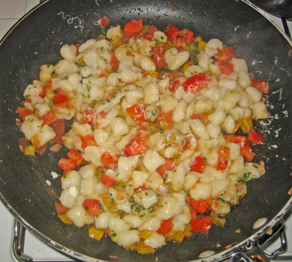 ricetta/recipe sul mio Blog il mondo di luvi